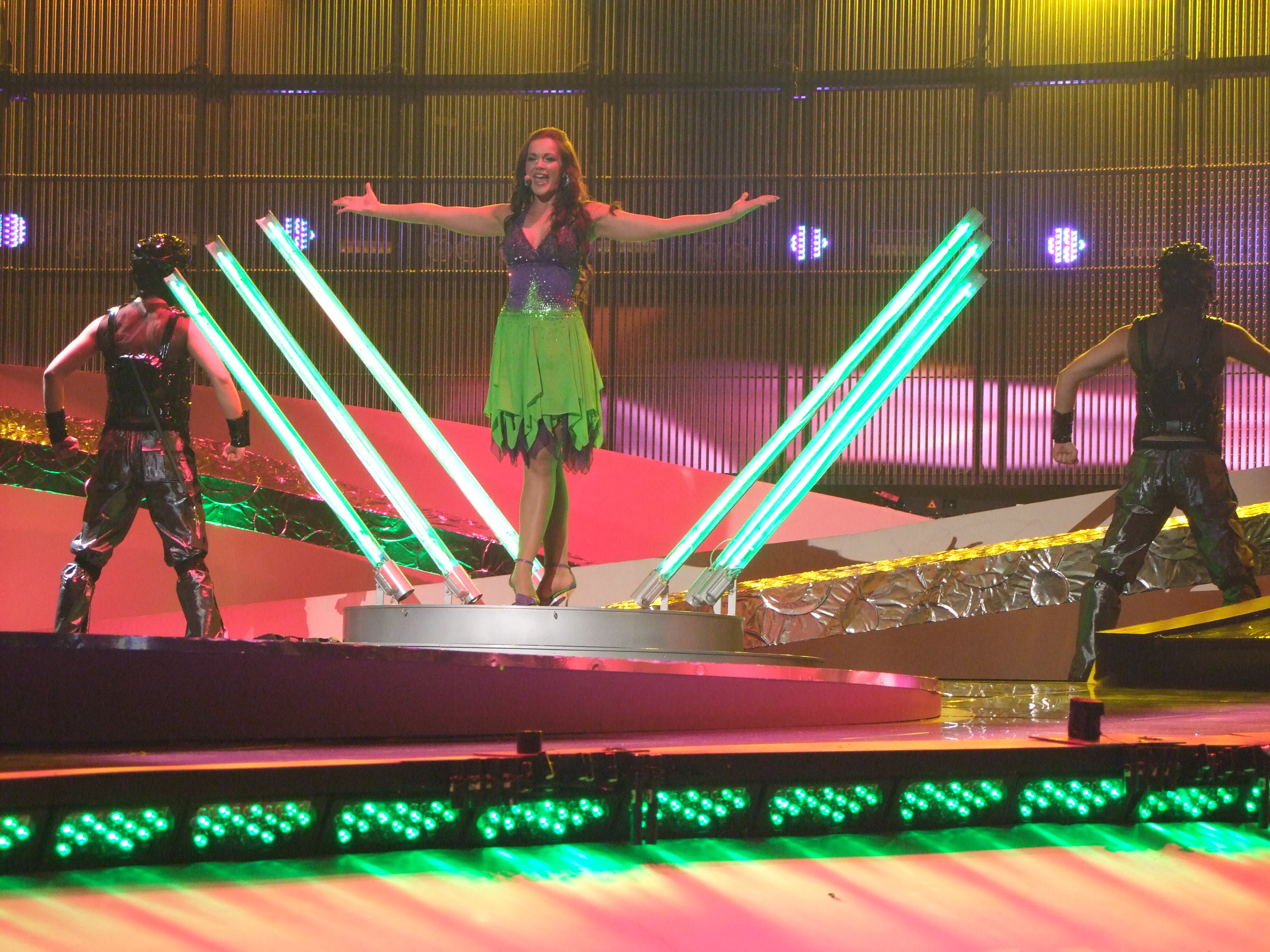 Semifinal 1 EUROVISION 2008